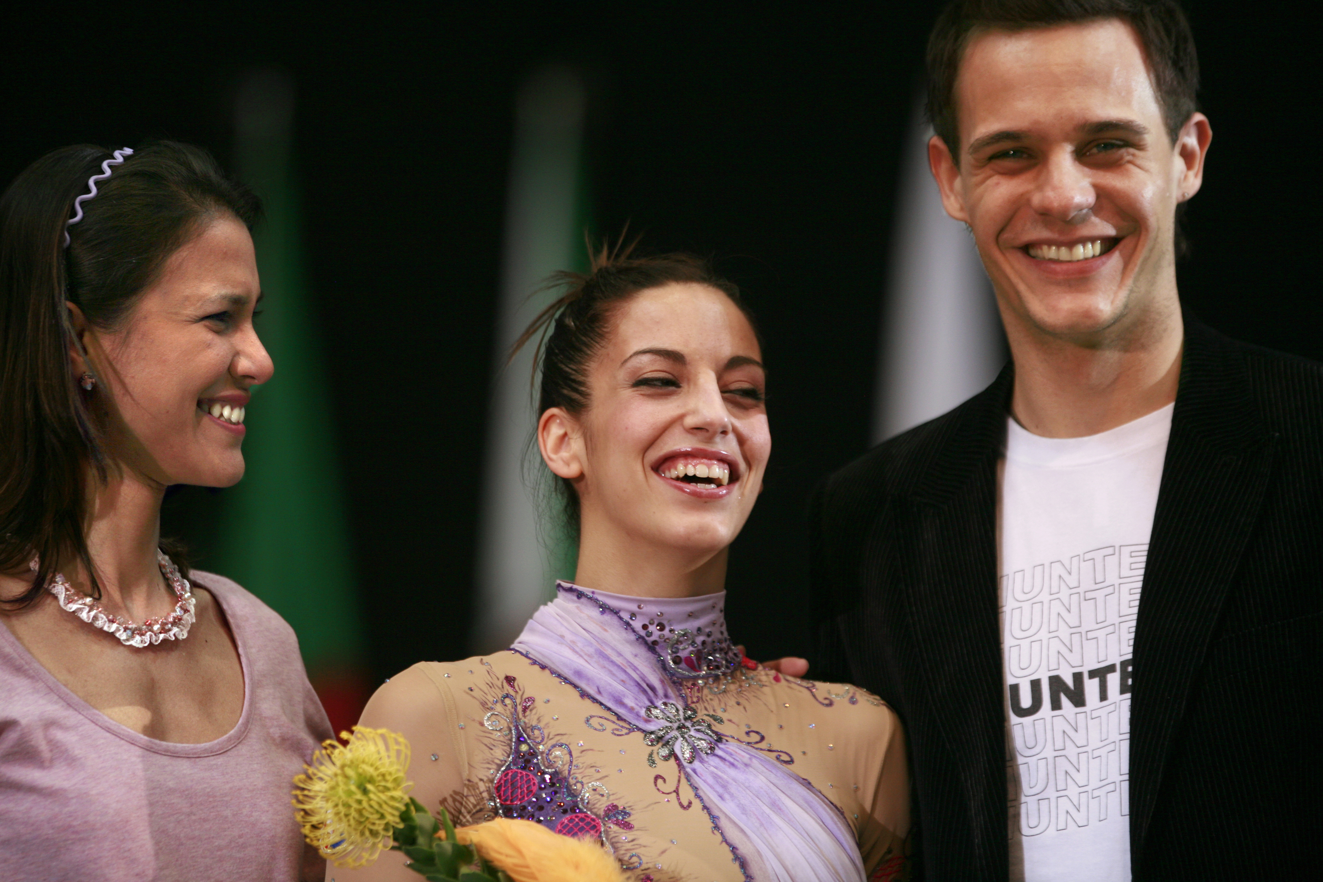 Almudena Cid recibiendo el Premio Dvillena a la Elegancia con su pareja (posteriormente marido) Christian Gálvez en la Copa del Mundo de Portimão en 2008.